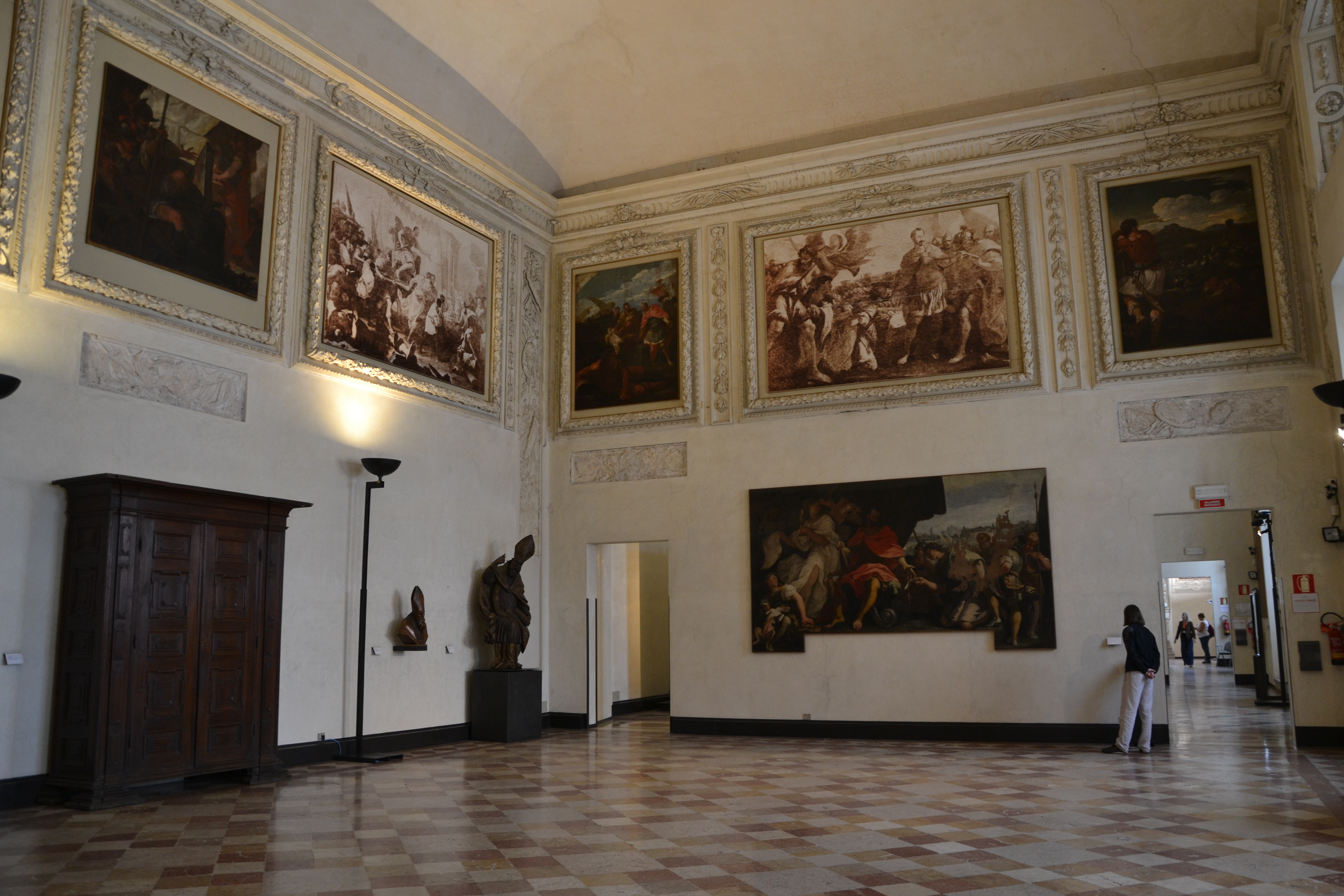 Palazzo Farnese - appartamento stuccato di Ranuccio II (1685), anticamera del Duca This is a photo of a monument which is part of cultural heritage of Italy.